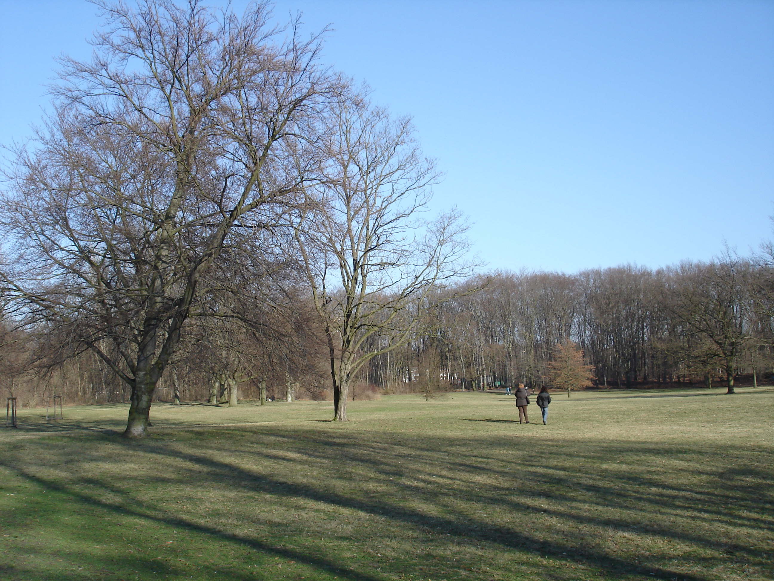 Volkspark Rehberge